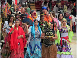 Caminhada pela Paz